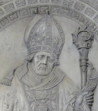 Johann Fabri, Epitaph im Wiener Stephansdom, Porträtrelief